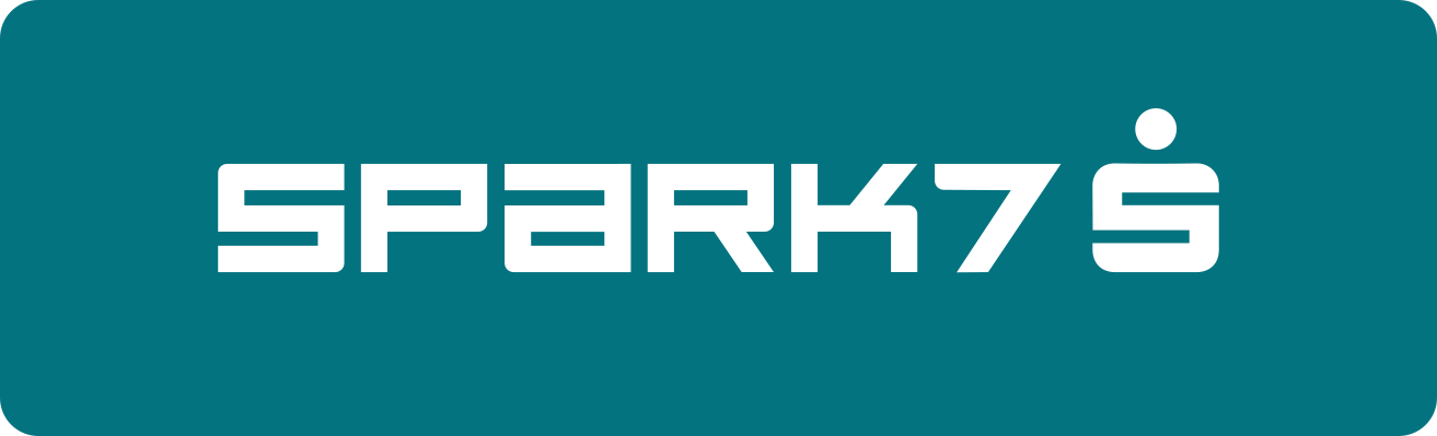 Logo